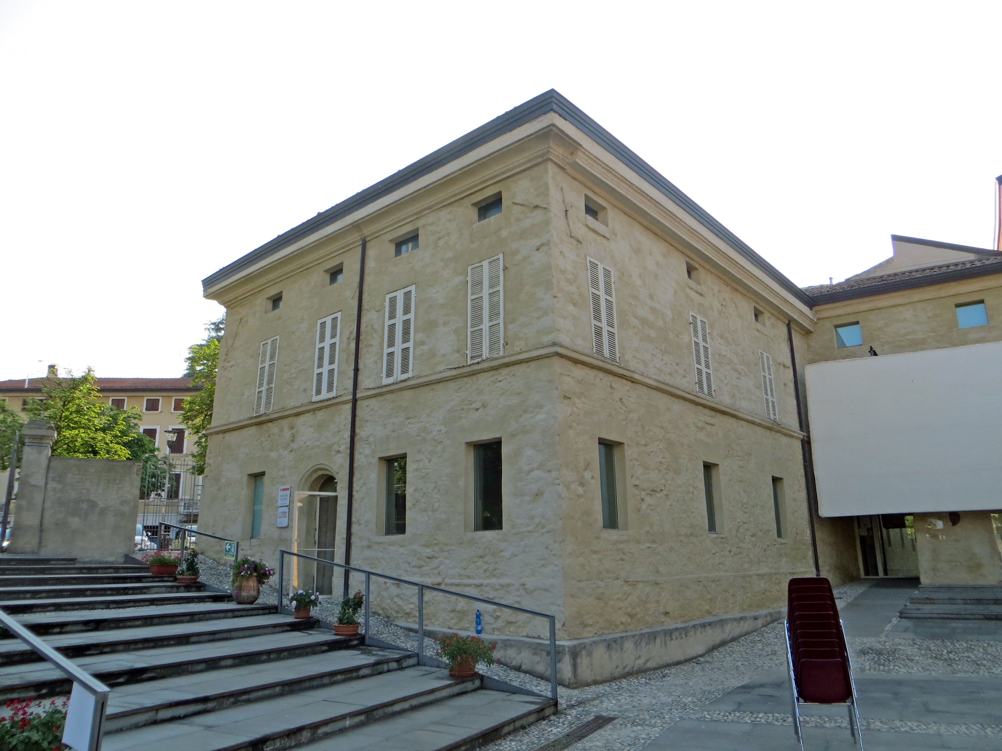 La Corte (Traversetolo) - lato sud